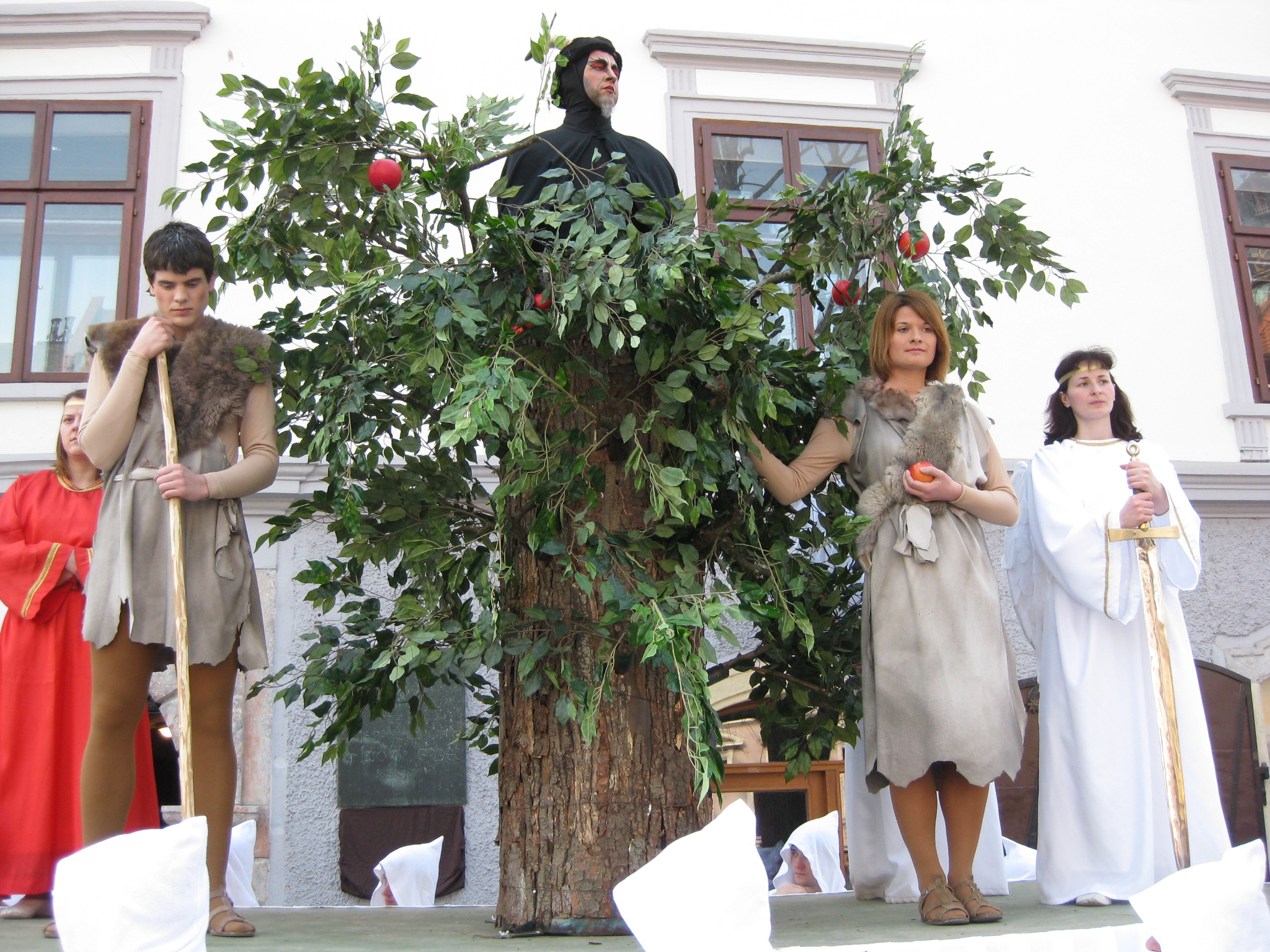 Škofjeloški pasijon (Processio Locopolitana), izvedba 2009 v Škofji Loki